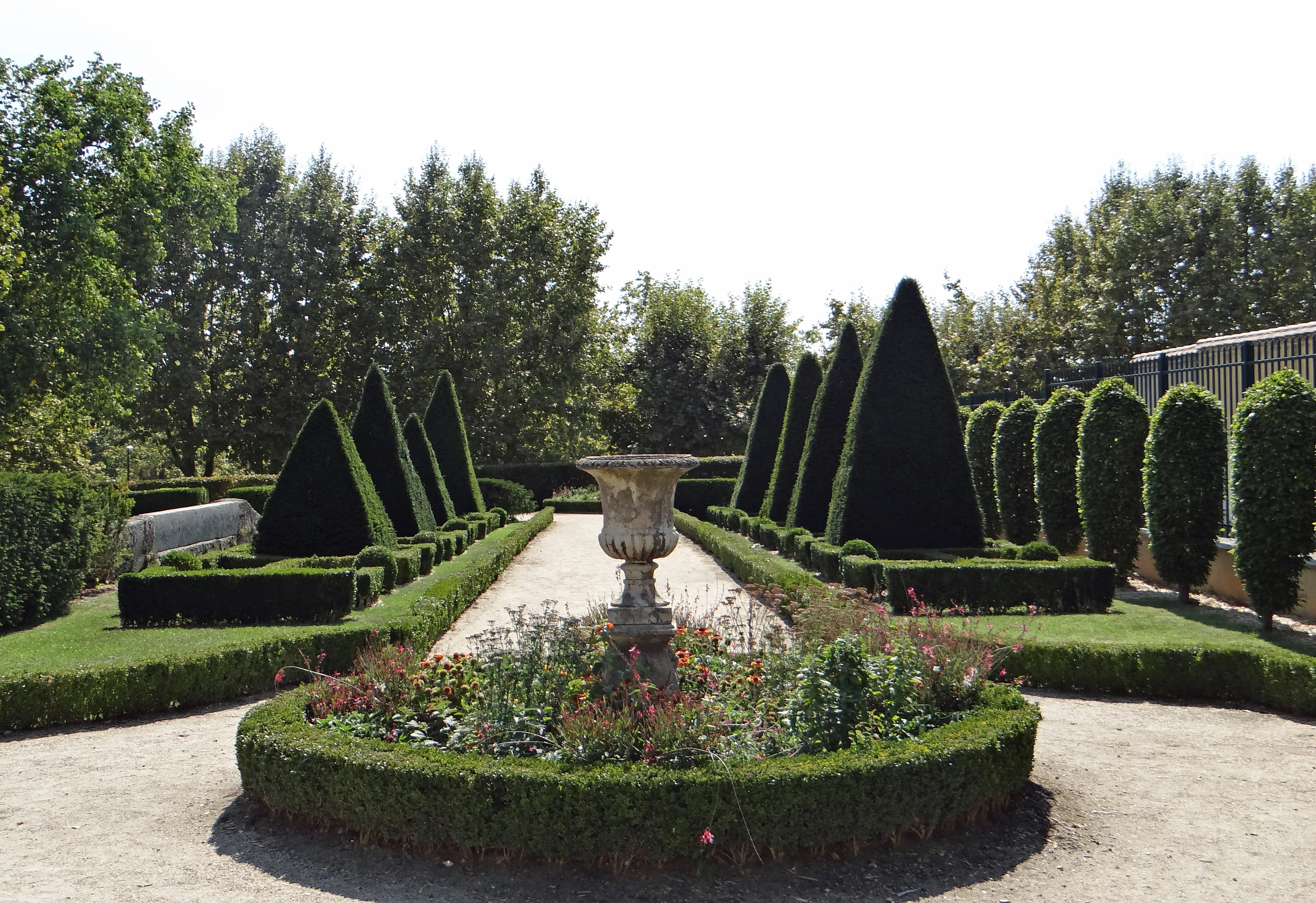 Marmande - Jardin du cloître de l'église Notre-Dame de Garonne